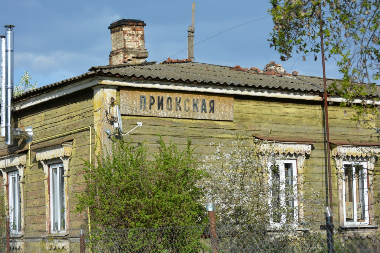 Старое здание вокзала, май 2015